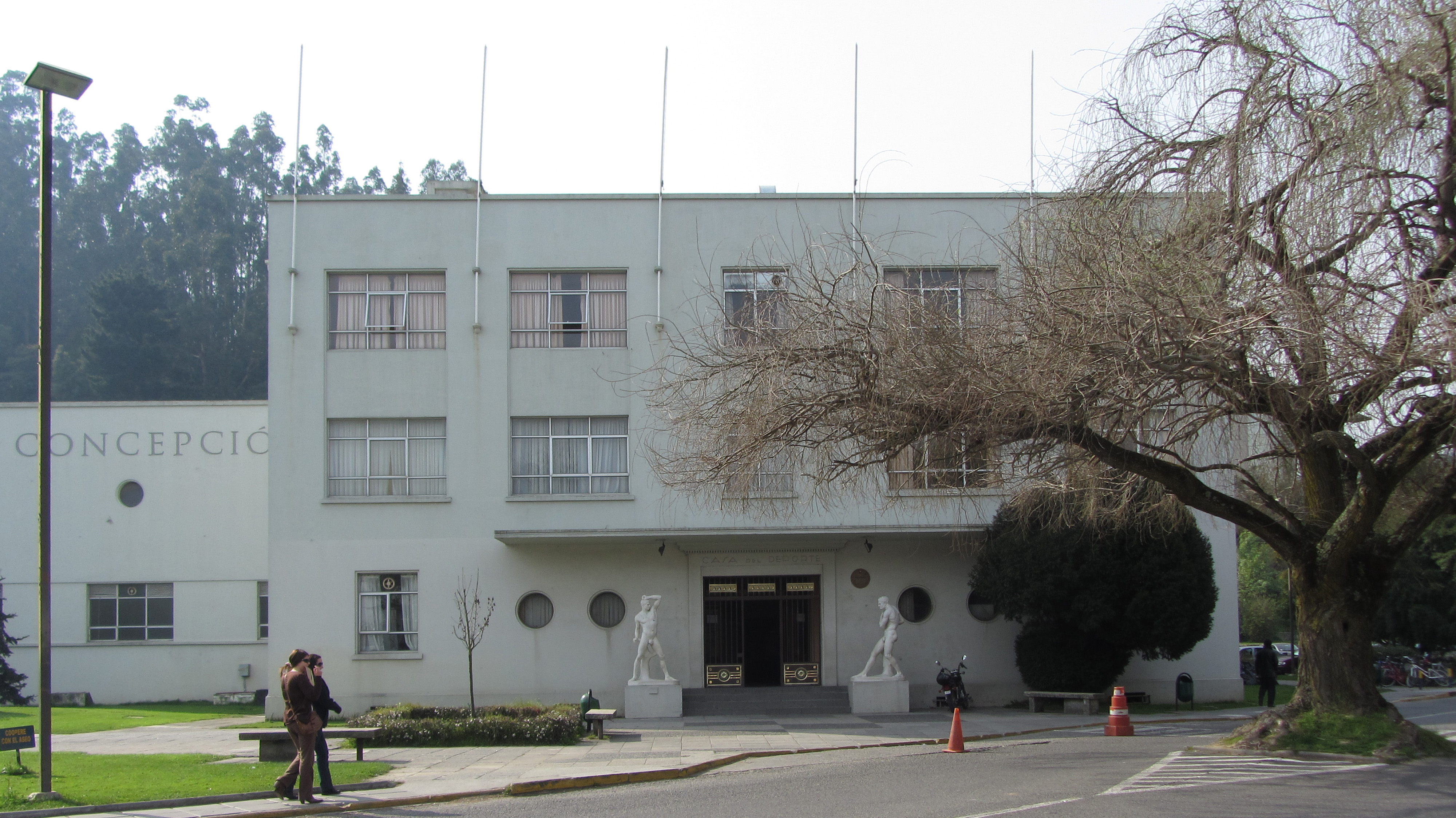 Casa del Deporte Ciudad Universitaria de Concepción Universidad de Concepción, Chile 2012